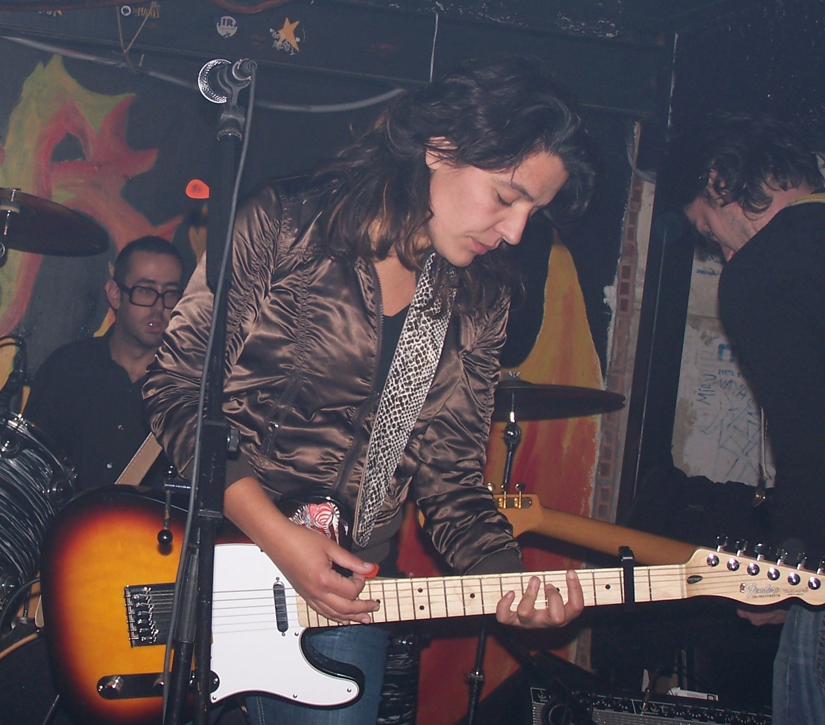 Anari Ordiziako gaztetxean